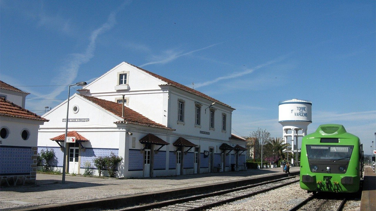 Vista geral da estação de Torre das Vargens. Allan 355 estacionada.